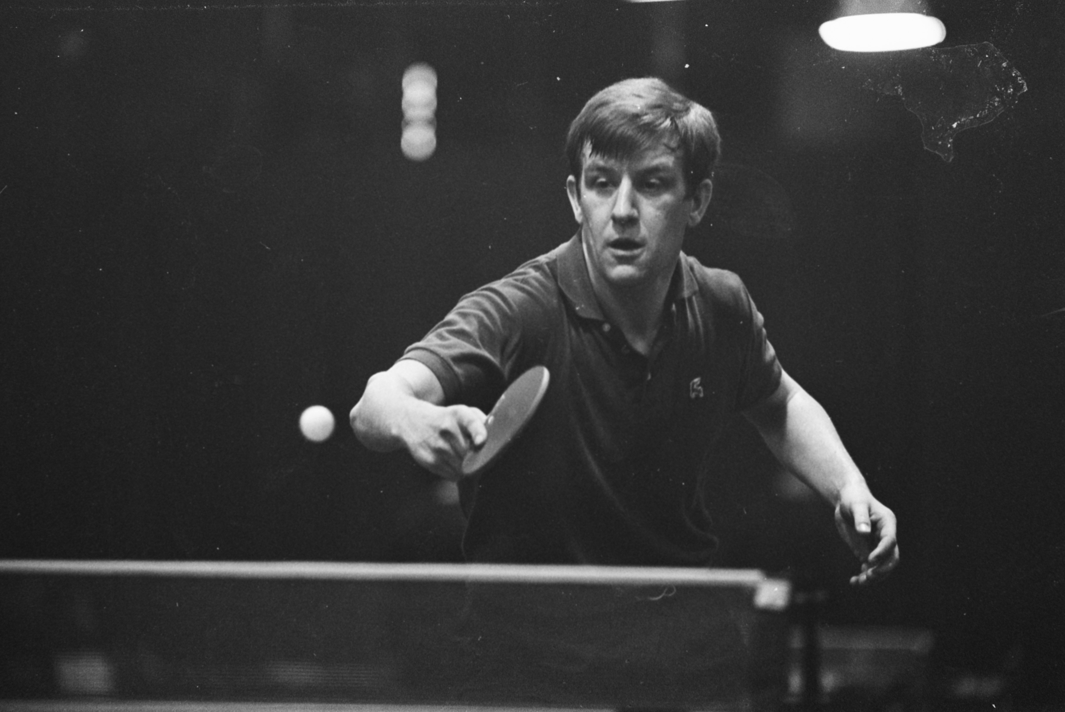 Collectie / Archief : Fotocollectie Anefo Reportage / Serie : [ onbekend ] Beschrijving : Nederlandse kampioenschappen Tafeltennis. Frans Schoofs in aktie Datum : 31 maart 1968 Trefwoorden : KAMPIOENSCHAPPEN, TAFELTENNIS Persoonsnaam : Frans Schoofs Fotograaf : Kroon, Ron / Anefo Auteursrechthebbende : Nationaal Archief Materiaalsoort : Negatief (zwart/wit) Nummer archiefinventaris : bekijk toegang 2.24.01.05 Bestanddeelnummer : 921-2093